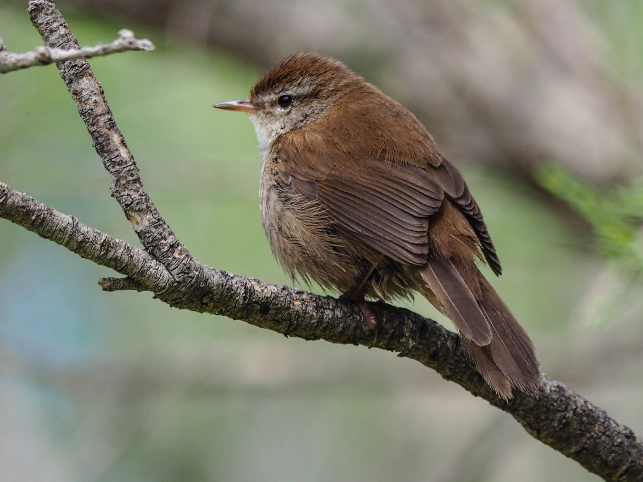 Cetti's Warbler